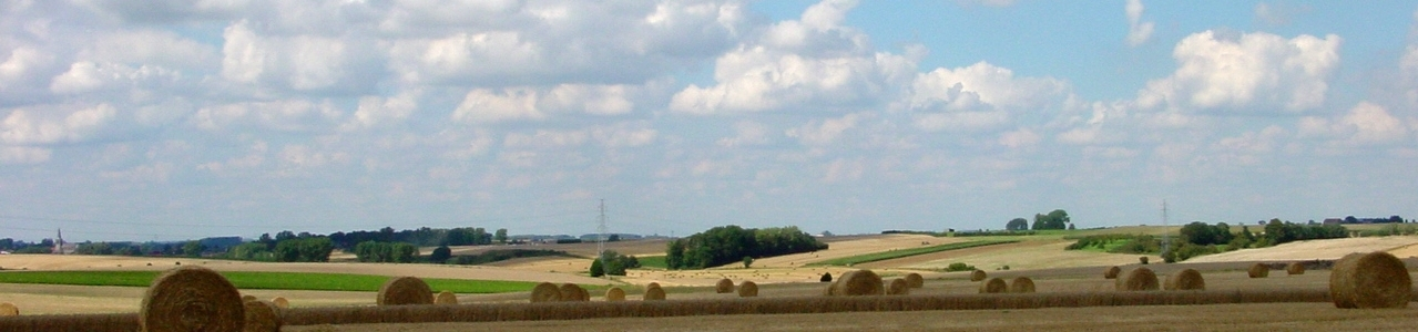 paysage d'openfield en Cambrésis (juillet)